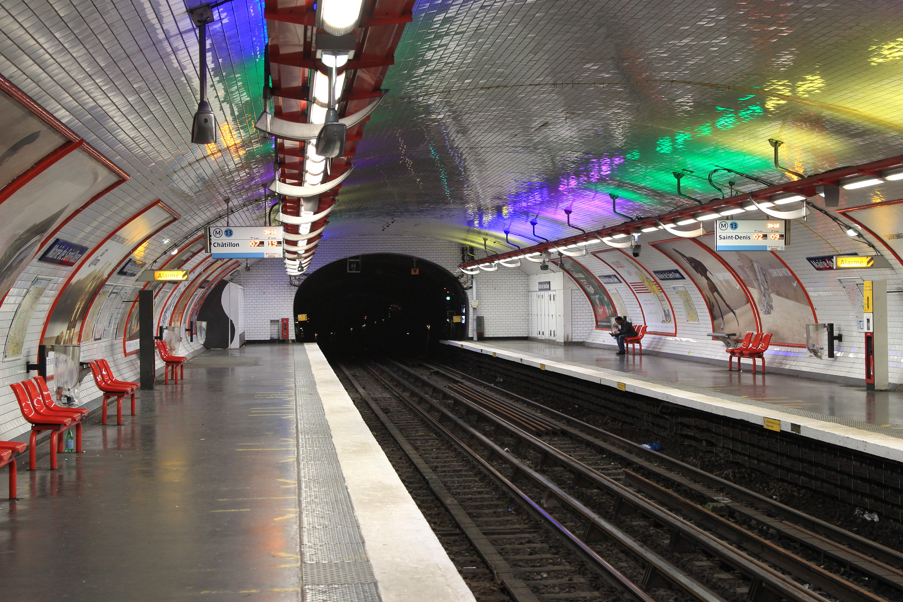 Quais de la station Mairie de Saint-Ouen de la ligne 13 du métro de Paris vus en direction de Saint-Denis.